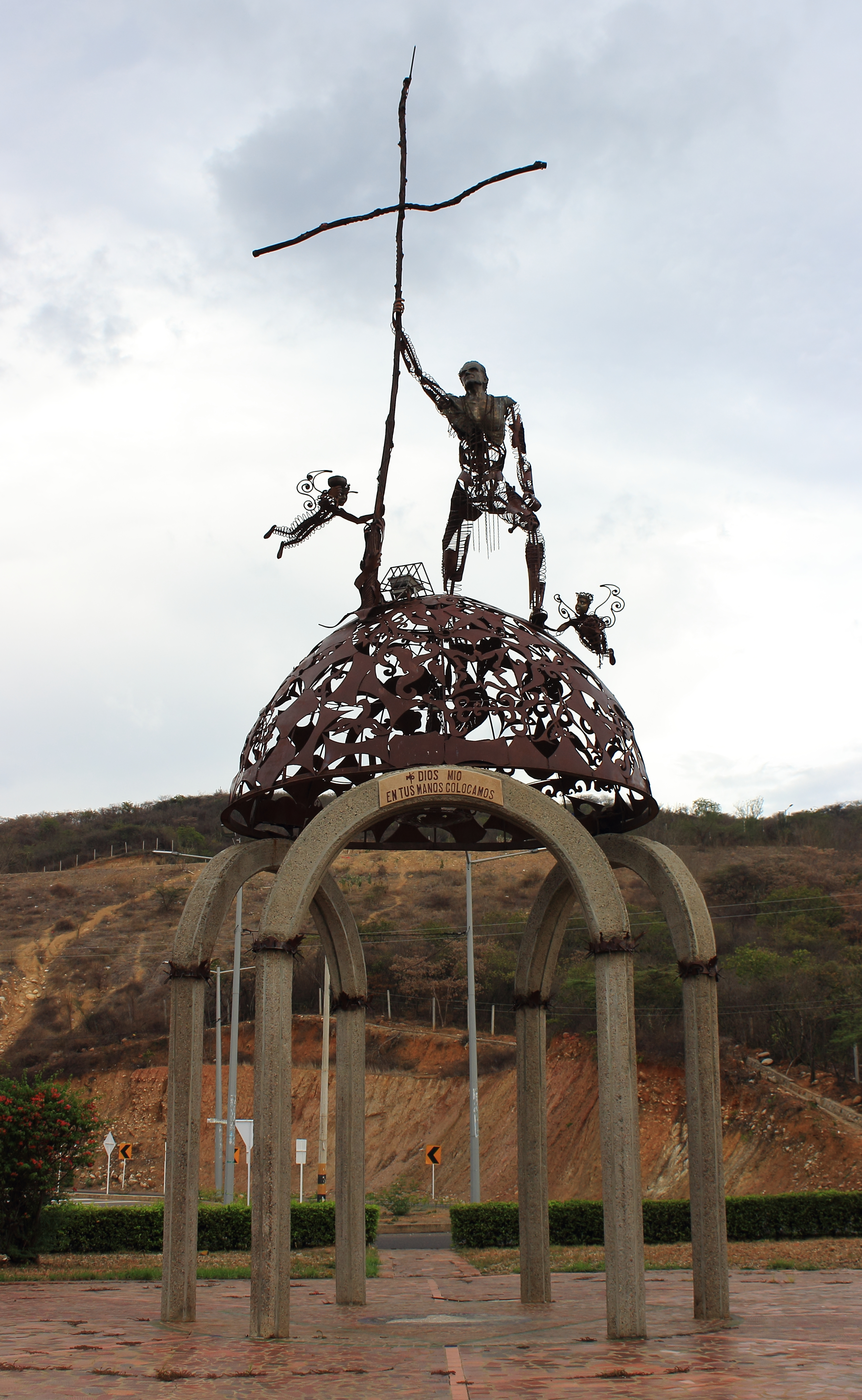 Monumento al Padre Rafael García Herreros ubicado por la Av0 y el Club tennis